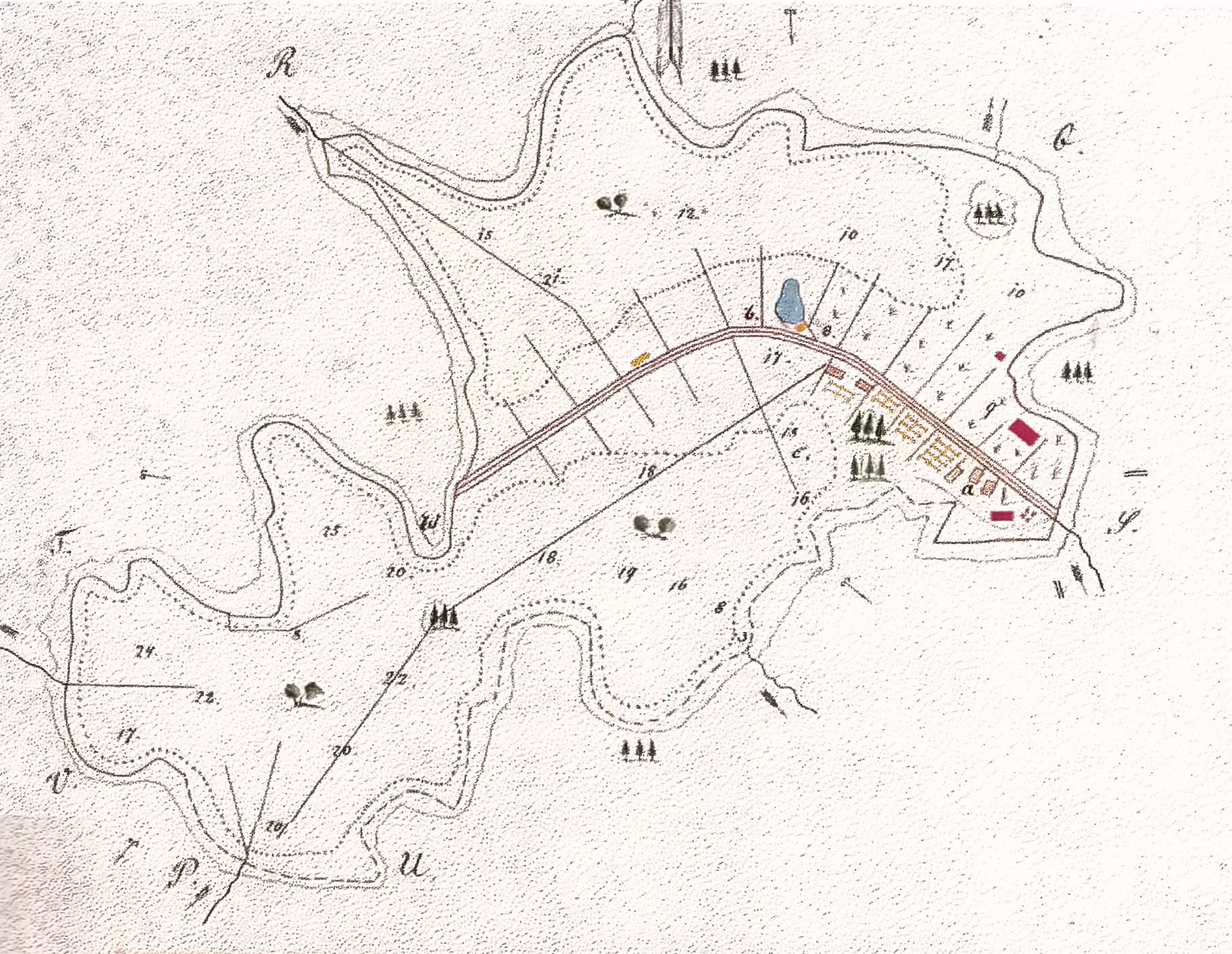 Bürmoos (Bezirk Salzburg-Umgebung): Karte des Bürmooser Moores aus dem Jahr 1856 von Joseph Roman Lorenz mit der Grundlosen Straße, dem noch vorhandenen Grundlosen See und erste Bauten im Raum des heutigen Zehmemoos.